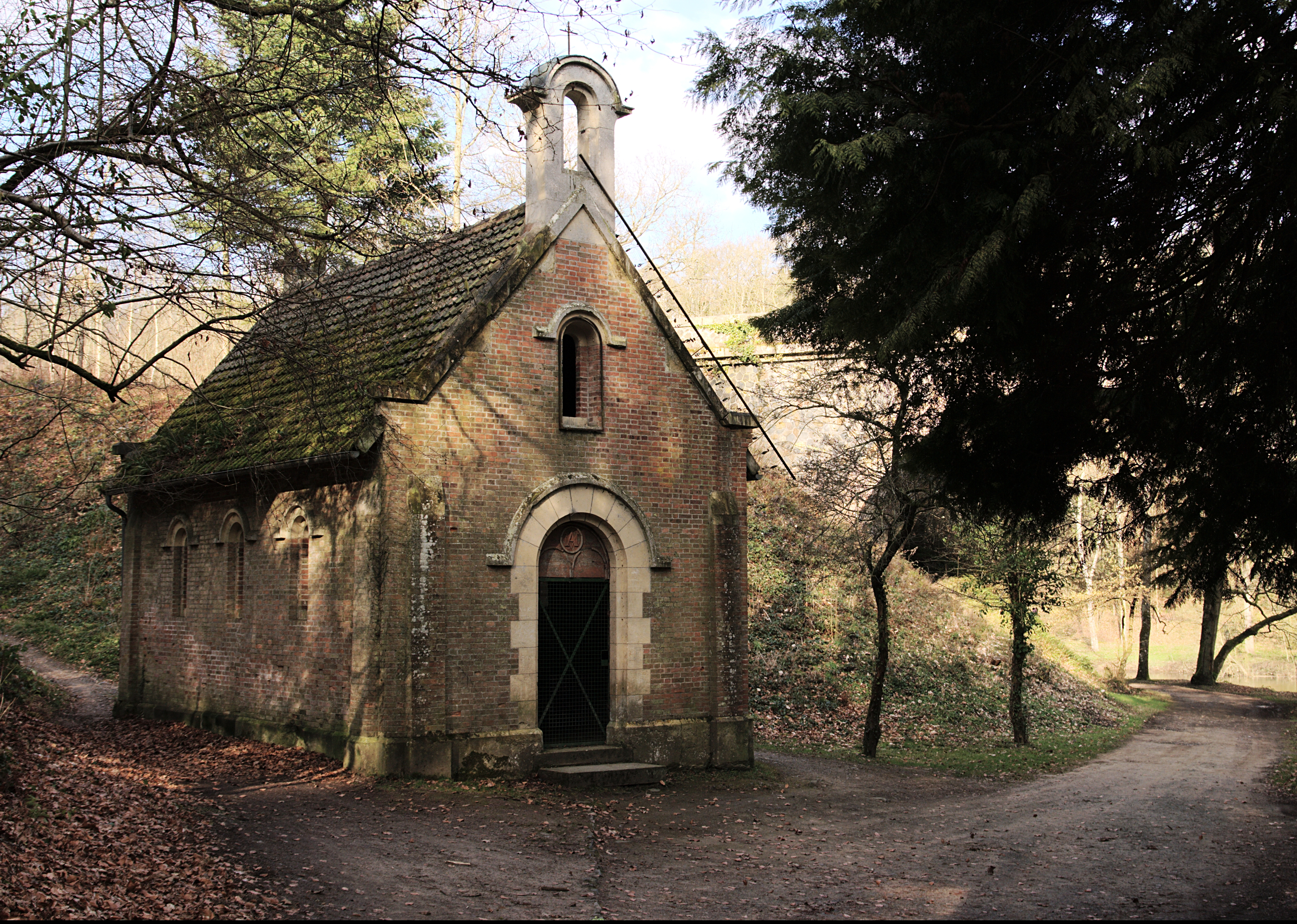 La chapelle Saint-Anne, sur les rives de la rivière Orne, dans la Forêt de Grimbosq.